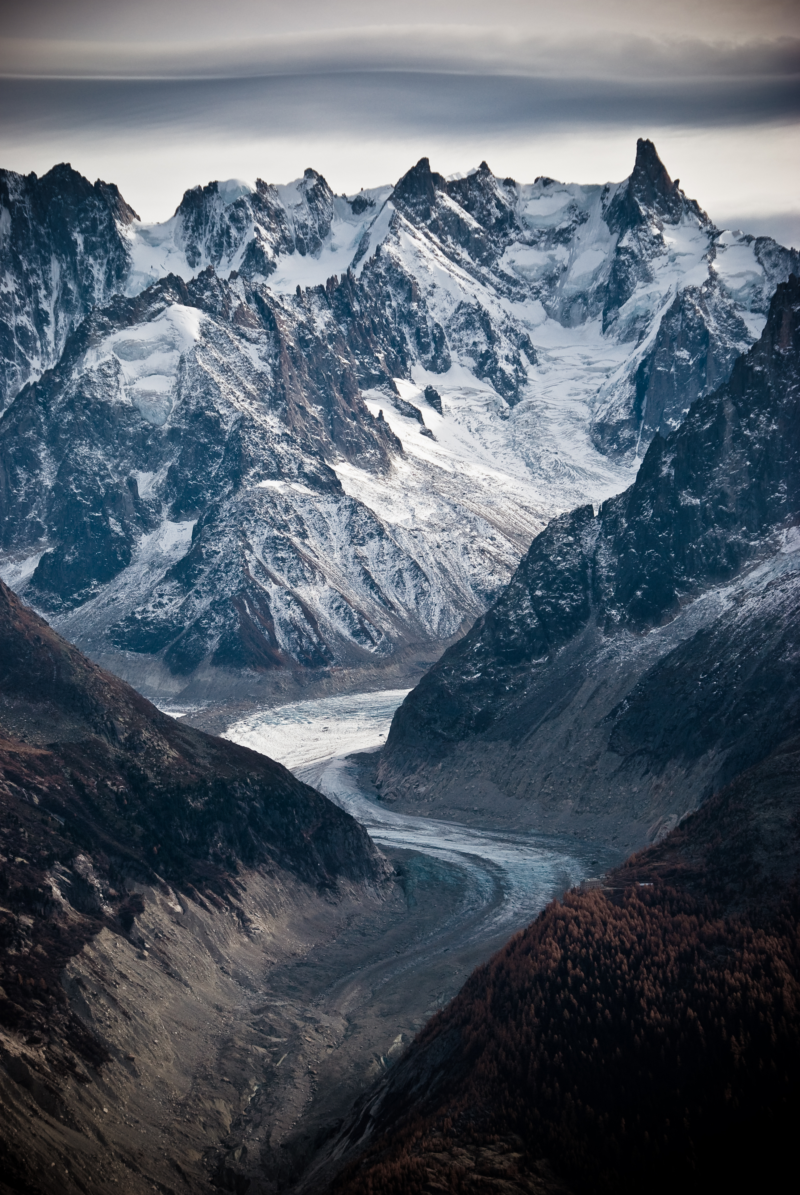 Mer de Glace